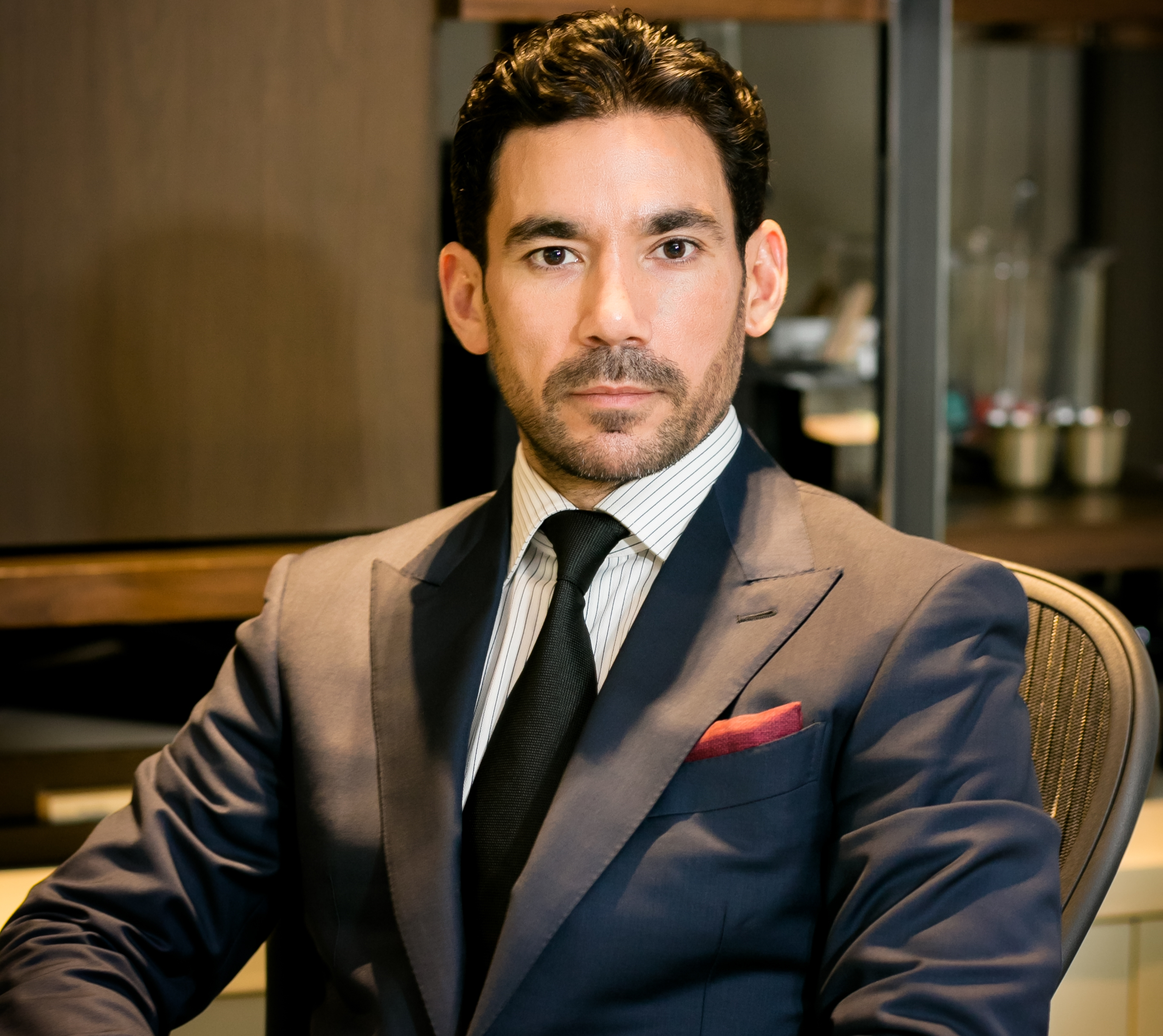 Empresario mexicano de desarrollo inmobiliario